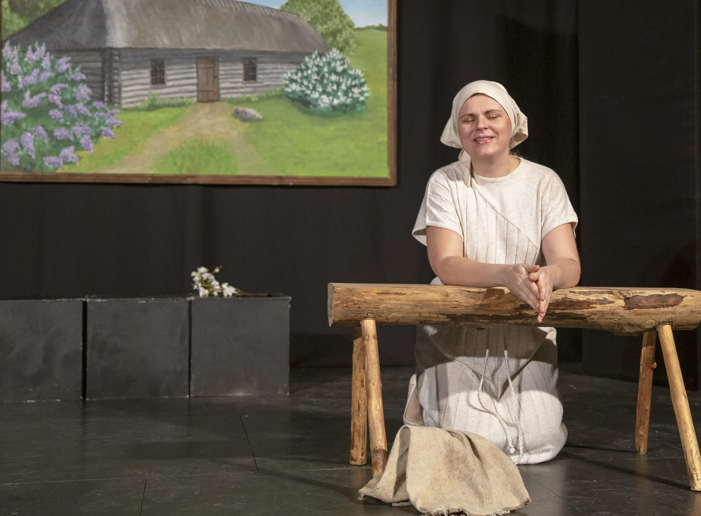 Etendus "... ja õunapuud õitsevad"